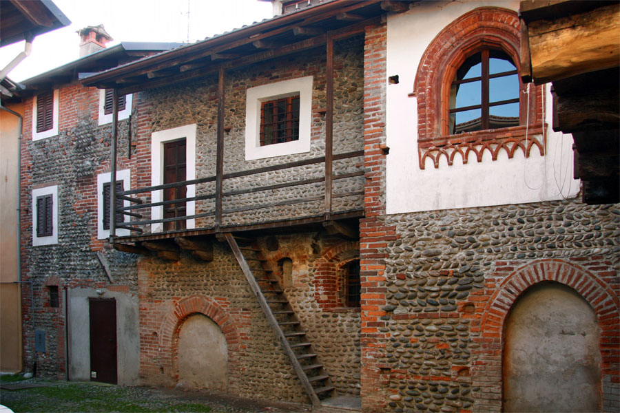 Scorcio del ricetto di Carpignano Sesia